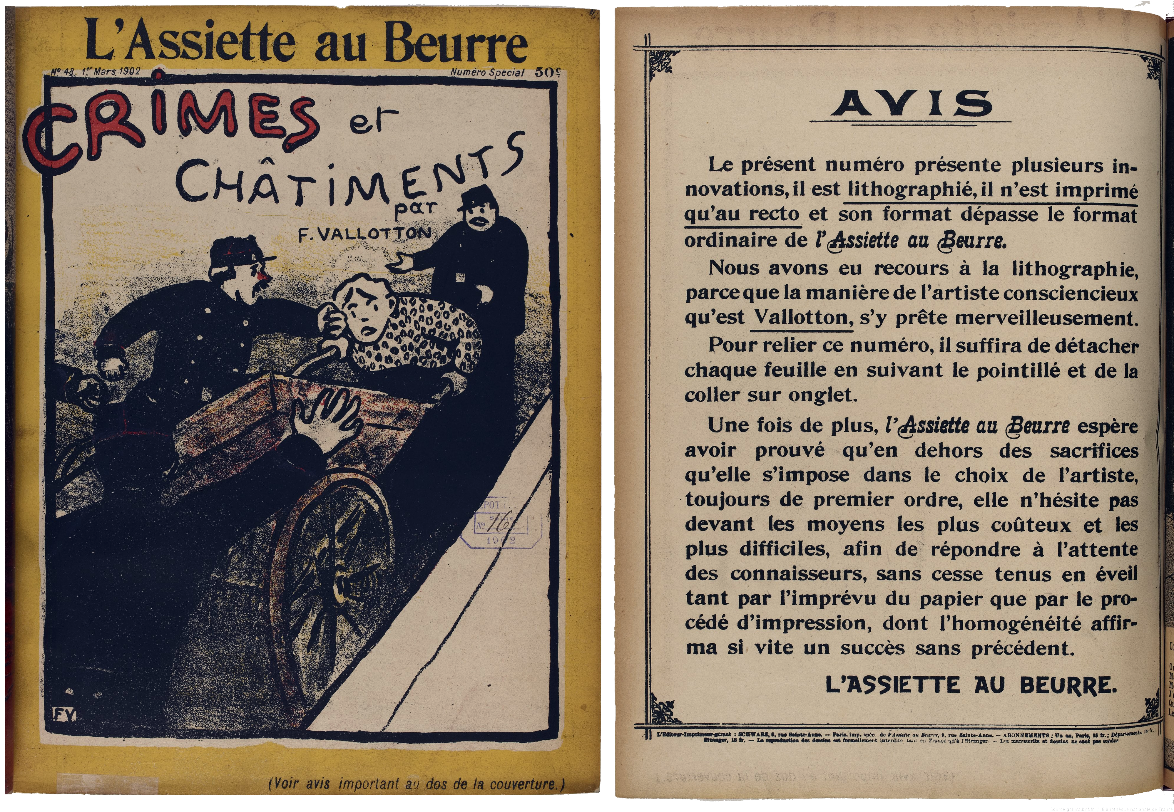 Première et dernière page du numéro spécial « Crimes et châtiments » de L'Assiette au beurre Texte Le présent numéro présente plusieurs innovations, il est lithographié, il n'est imprimé qu'au recto, et son format dépasse le format ordinaire de l'Assiette au Beurre. Nous avons eu recours à la lithographie, parce que la manière de l'artiste consciencieux qu'est Vallotton s'y prête merveilleusement. Pour relier ce numéro, il suffira de détacher chaque feuille, en suivant le pointillé et de la coller sur onglet. Une fois de plus, l'Assiette au Beurre espère avoir prouvé qu'en dehors des sacrifices qu'elle s'impose dans le choix de l'artiste, toujours de premier ordre, elle n'hésite pas devant les moyens les plus coûteux et les plus difficiles, afin de répondre à l'attente des connaisseurs, sans cesse tenu en éveil tant par l'imprévu du papier que par le procédé d'impression, dont l'homogénéité affirma si vite un succès sans précédent.